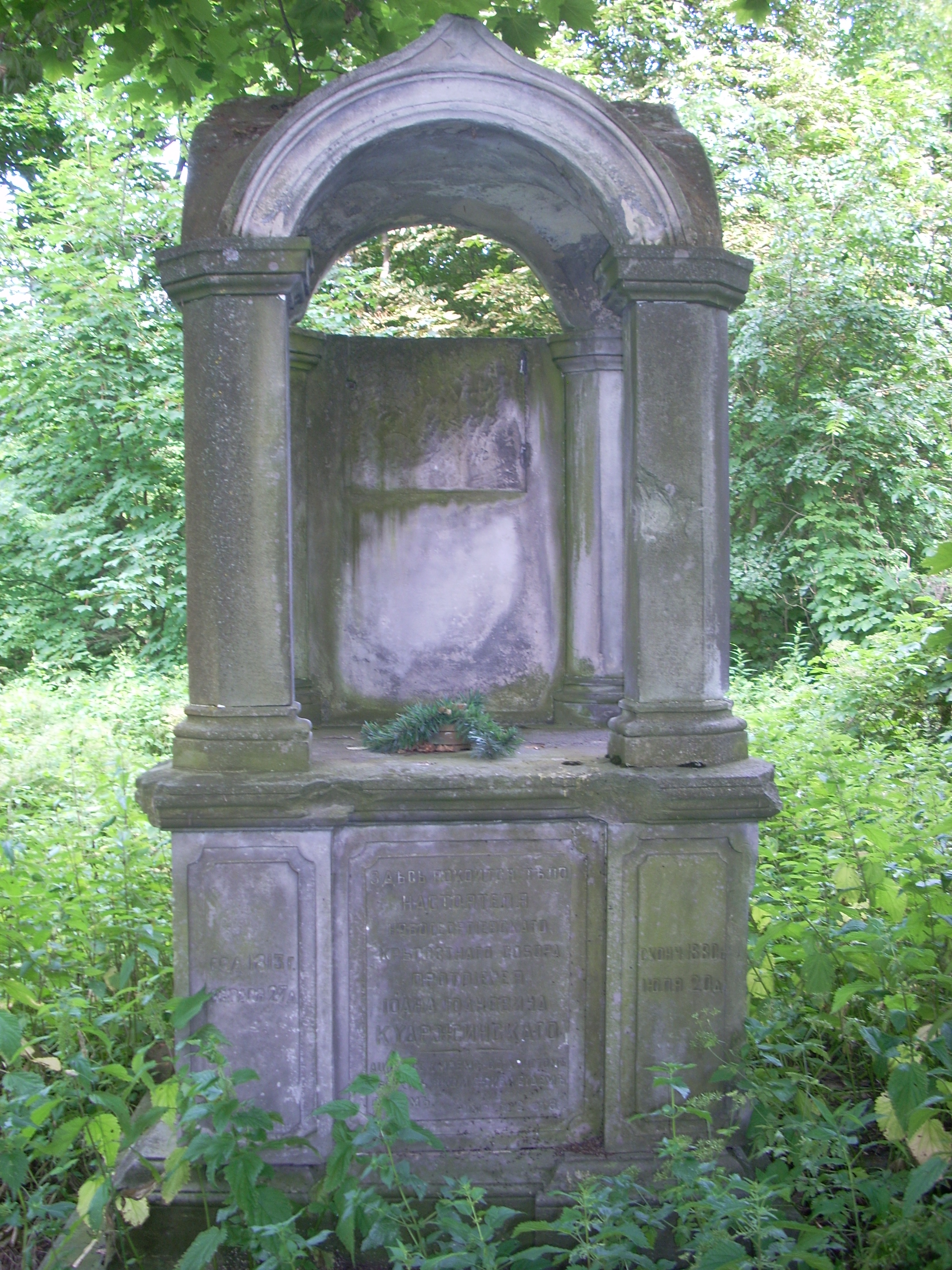 Nagrobek protoprezbitera soboru św. Jerzego w Modlinie na prawosławnym cmentarzu wojskowym w Nowym Modlinie